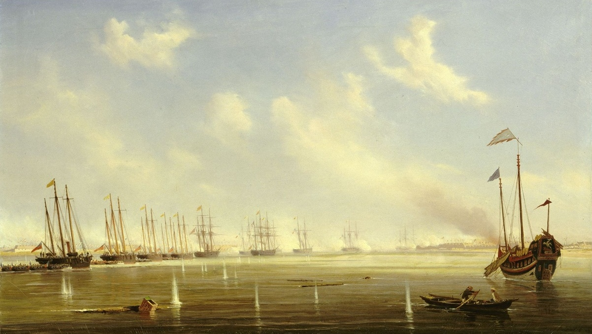 Attaque et prise des forts du Peï-Ho, 20 mai 1858. Seconde Guerre de l'opium (1856-1860). Toile (peinture à l'huile). Mesures : H. 71 cm, l. 121.5 cm. H. 97 cm, l. 149 cm (cadre).